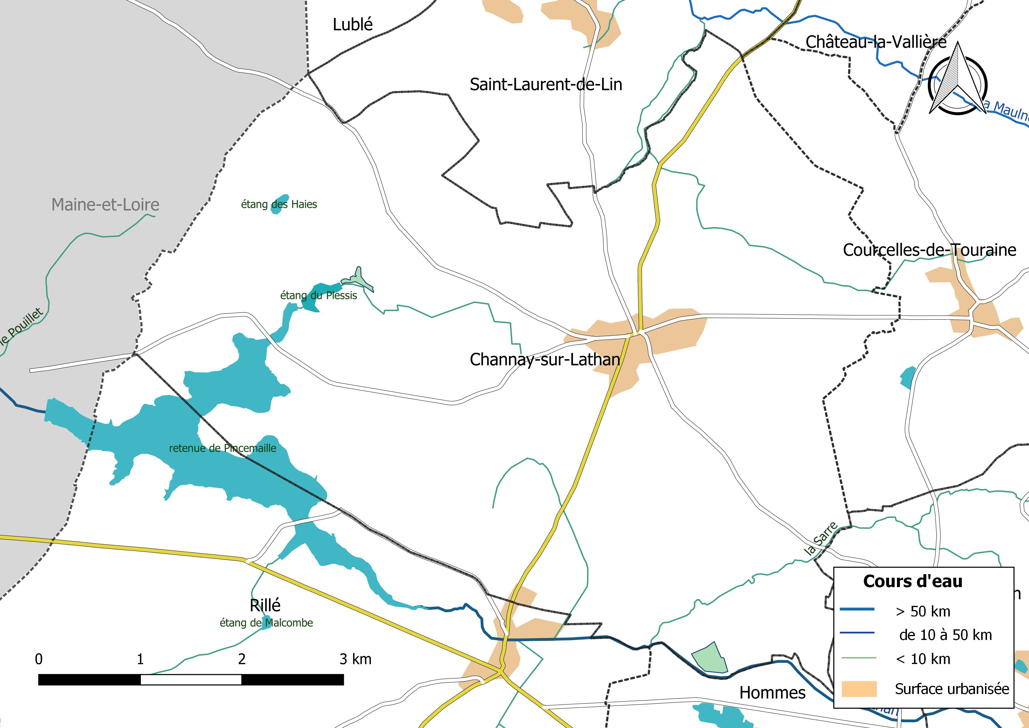 Carte du réseau hydrographique de la commune de Channay-sur-Lathan (France).